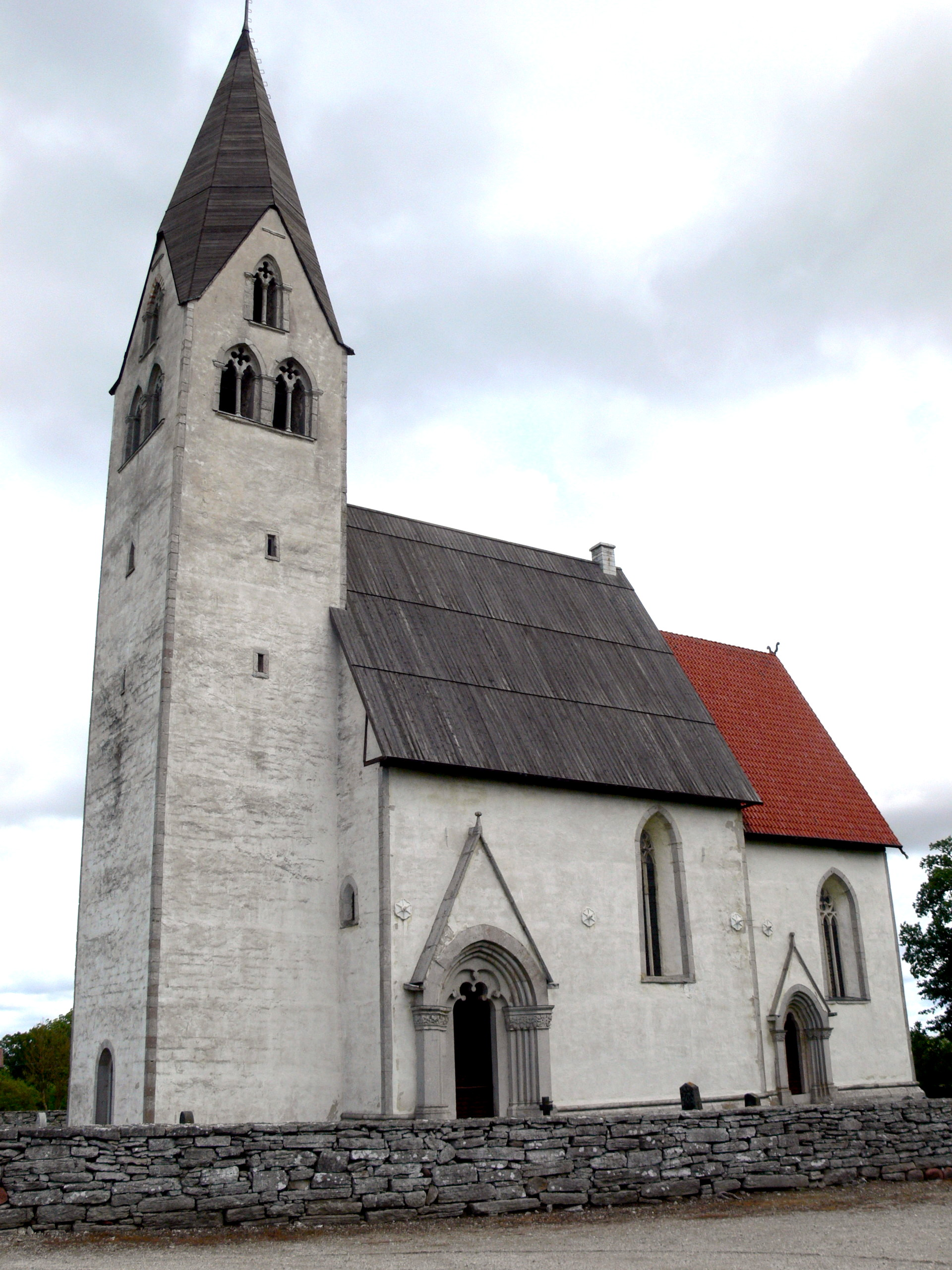 Ekeby kyrka auf Gotland. Außenansicht